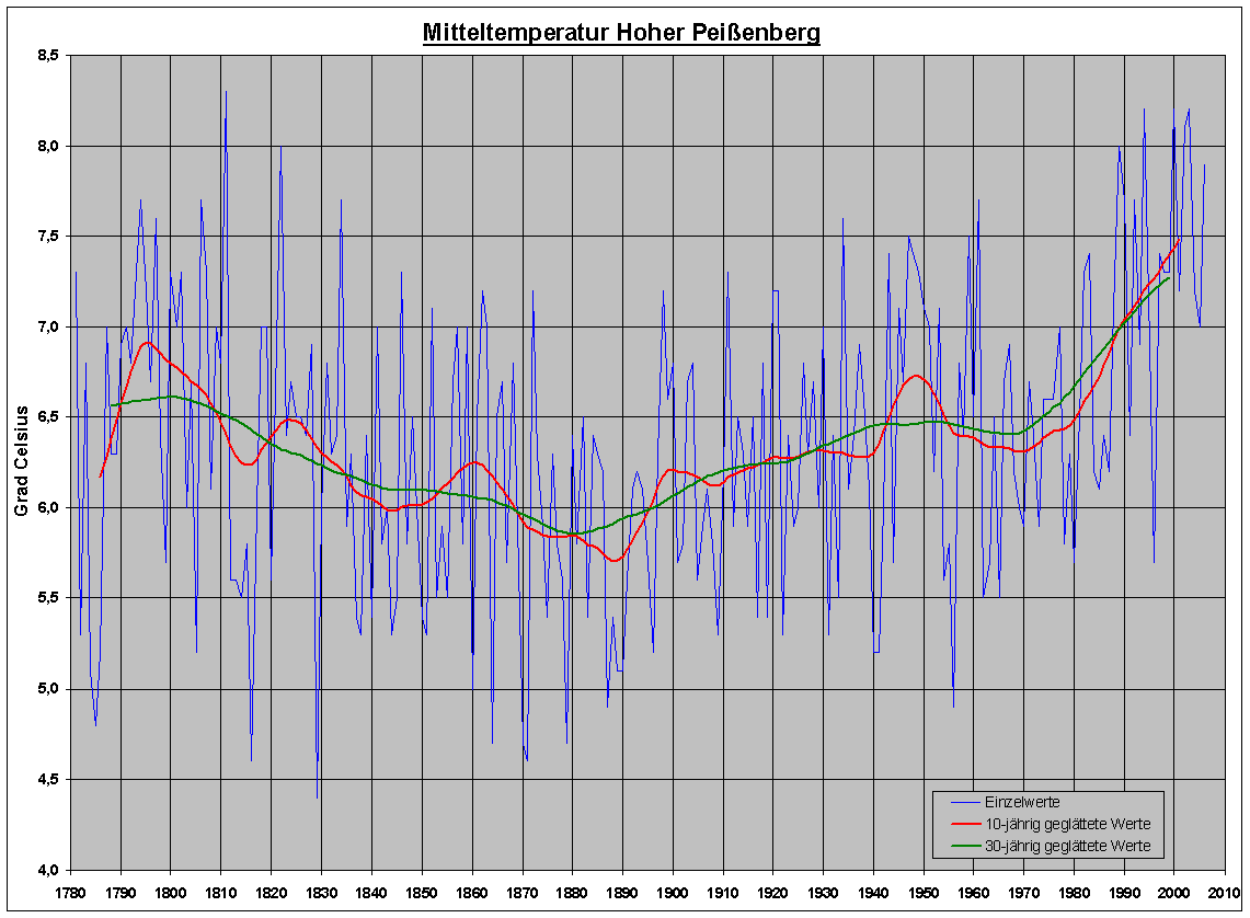 Historische Temperaturreihe Hoher Peißenberg (unnormierte Meßdaten)